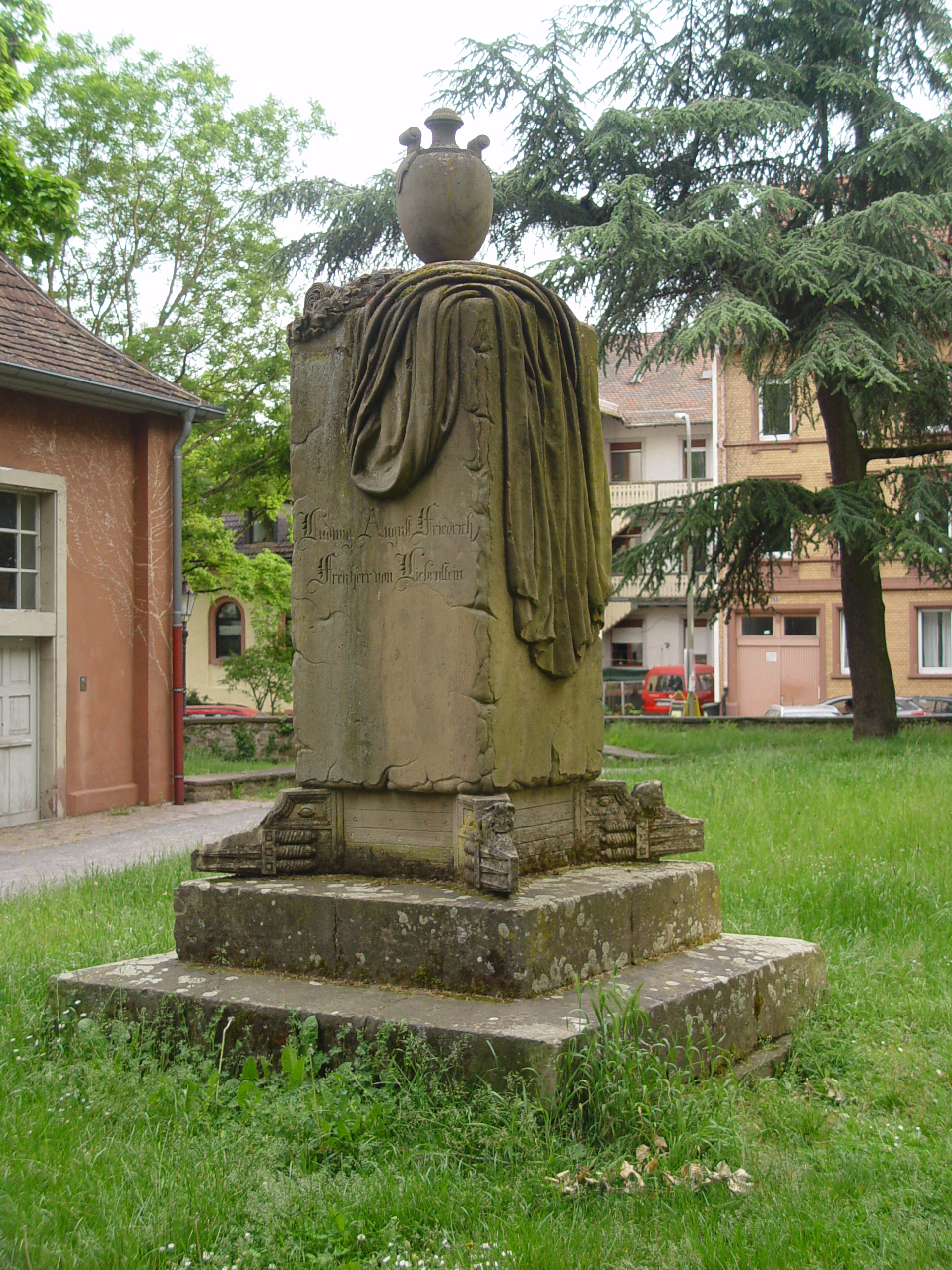 Grabdenkmal II